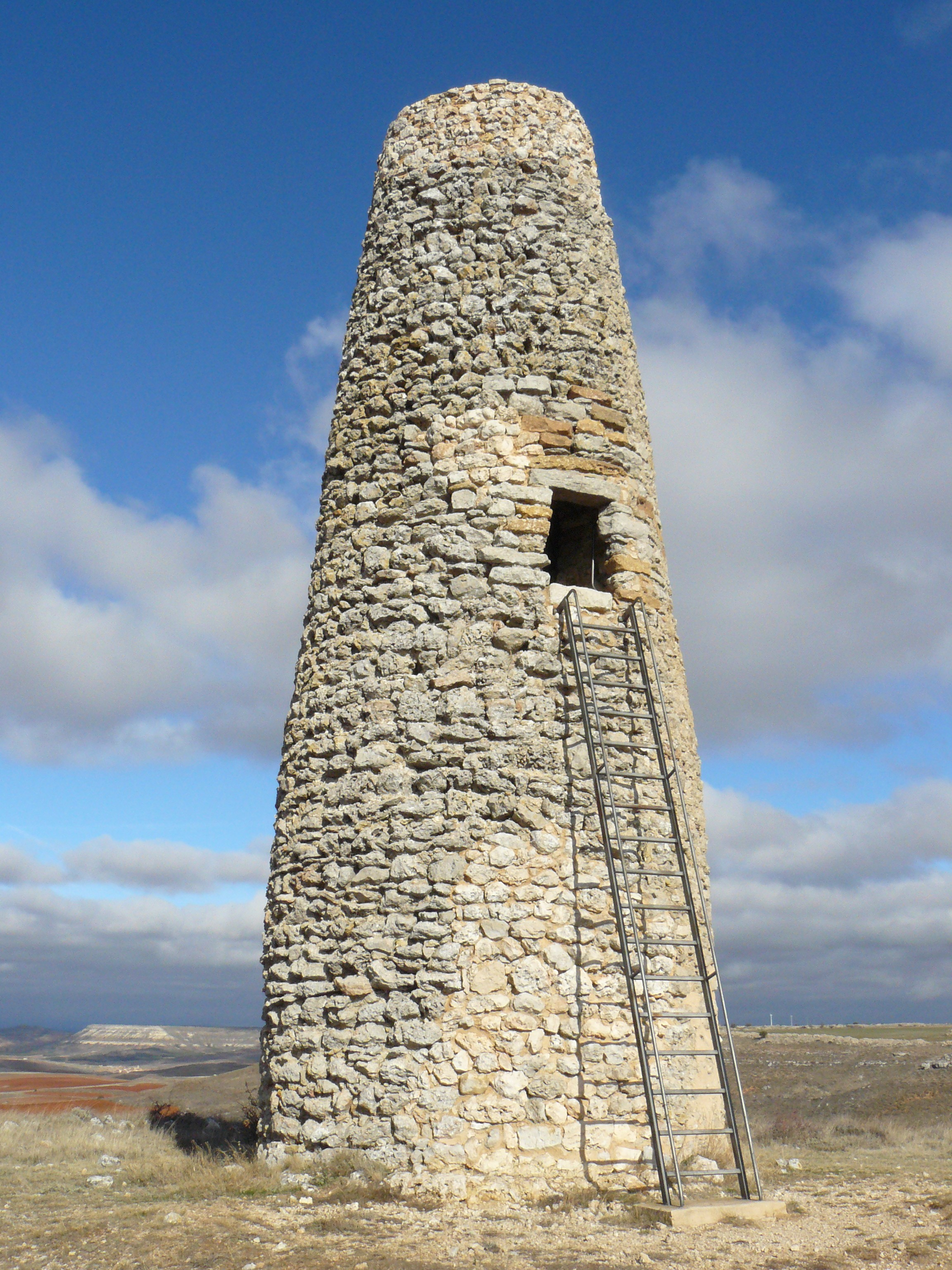 Atalaya islámica del Tiñón, Rello, Soria.